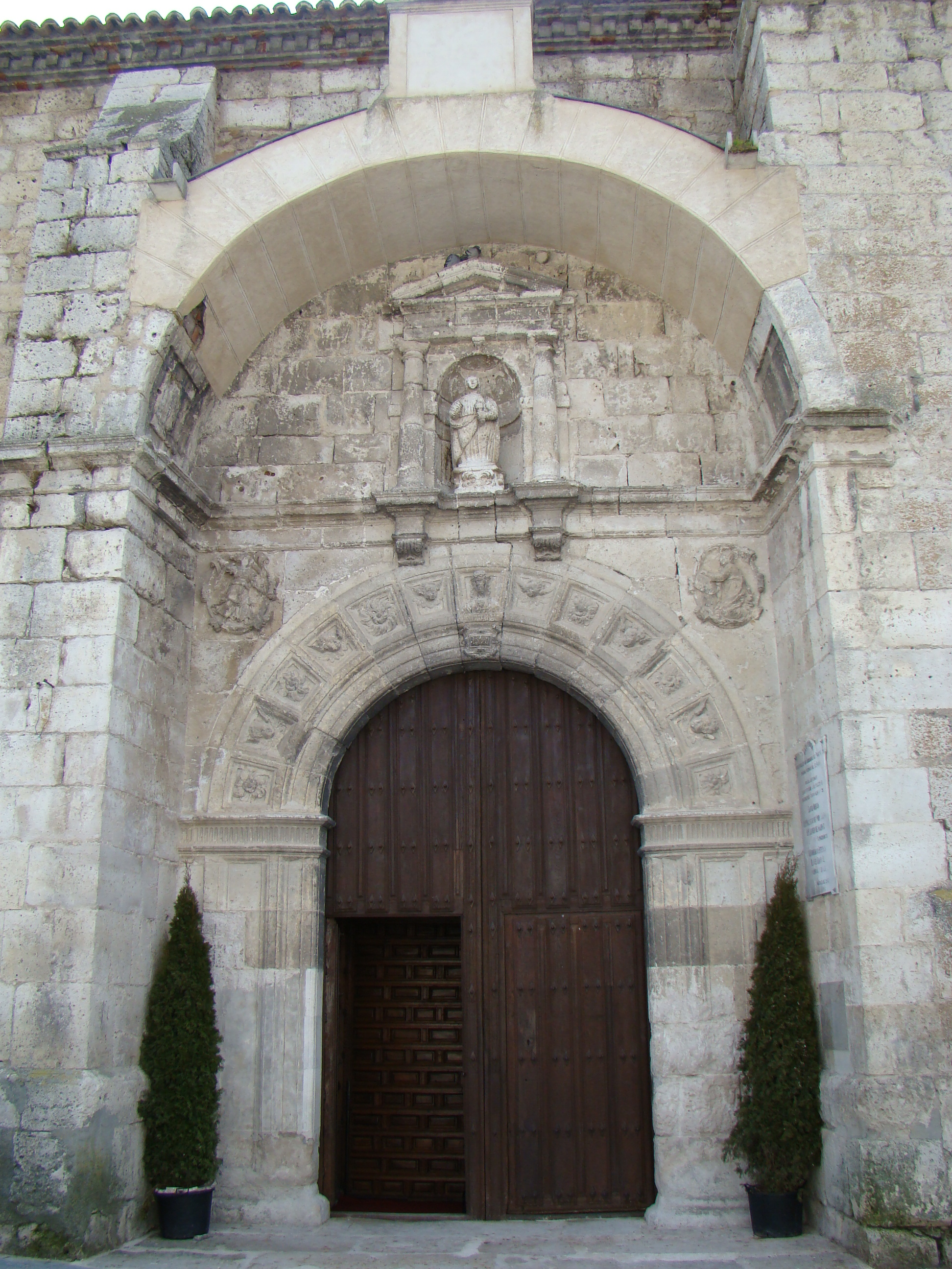 Iglesia de San Juan Bautista en la localidad de Arrabal de Portillo (Valladolid, España). Portada principal, renacentista, situada en el lado del Evangelio. Tiene un grueso arco de medio punto, cuyas dovelas están decoradas con casetones en los que alternan rosetas y cabezas de ángeles, salvo en la clave, en donde figura el rostro de Cristo y la fecha de 1570. En las enjutas del arco se disponen dos medallones con el Arcángel San Gabriel y la Virgen, formando la escena de la Anunciación. En el segundo cuerpo, figura dentro de una hornacina, una tosca escultura en piedra del titular situada entre dos columnas.